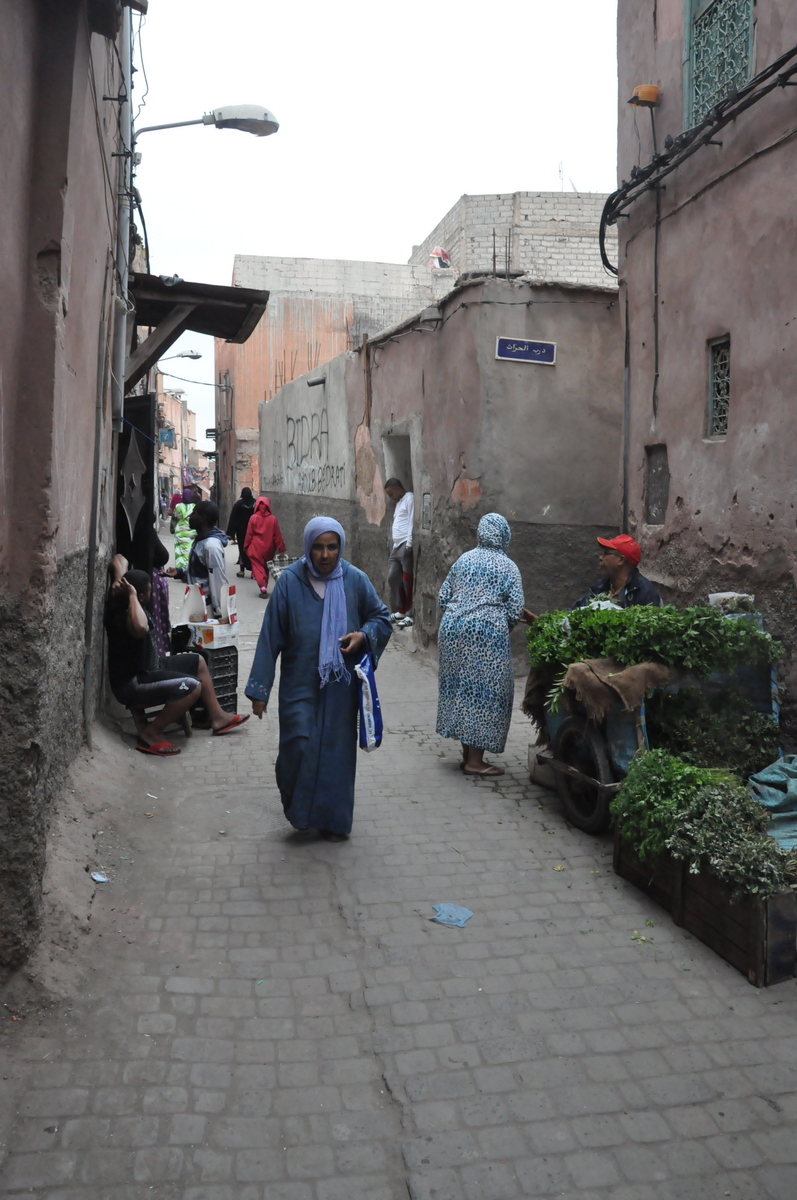 Mellah de Marrakech, antiguo barrio judío